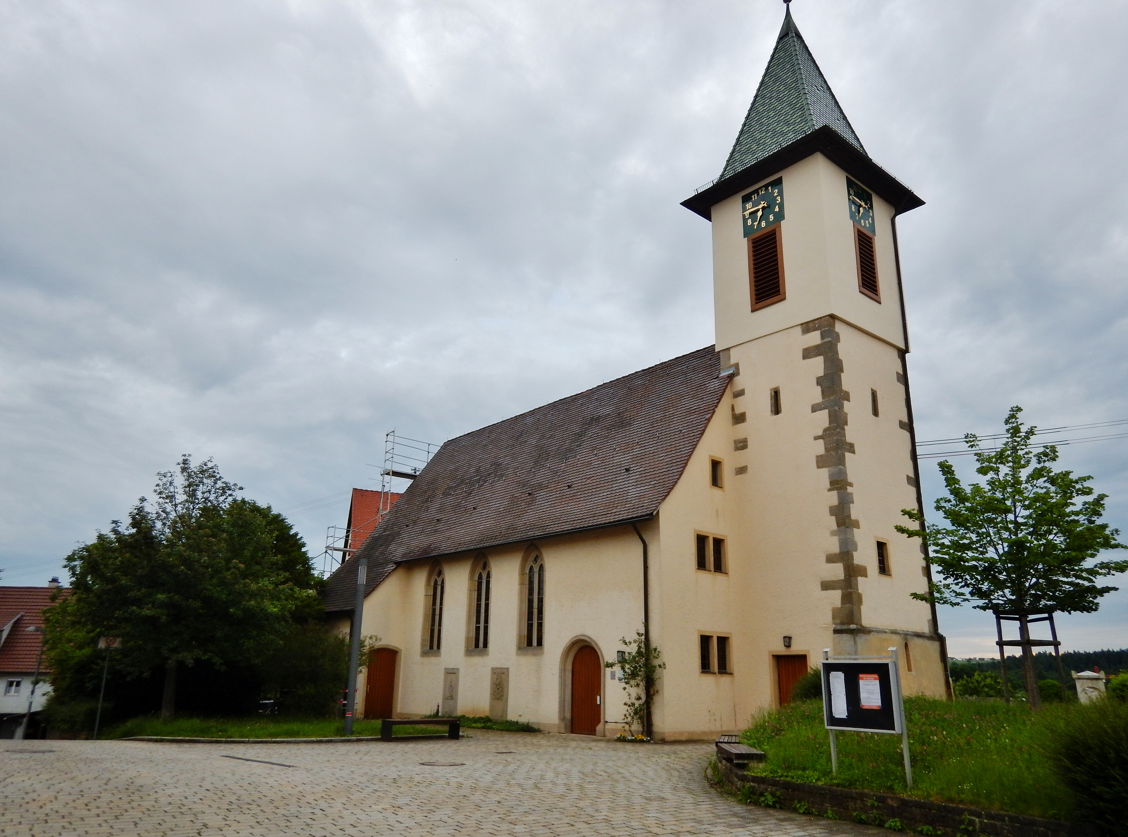 Michaels-Kirche in Grafenberg: 1246 erstmals erwähnt. Der heutige Kirchenbau geht auf einen Neubau von 1726 zurück.